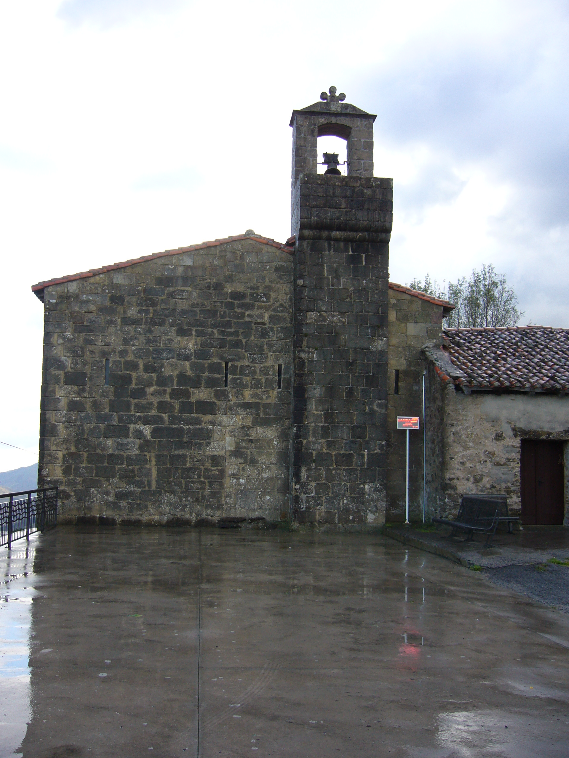 Aiako Elkanoko eliza